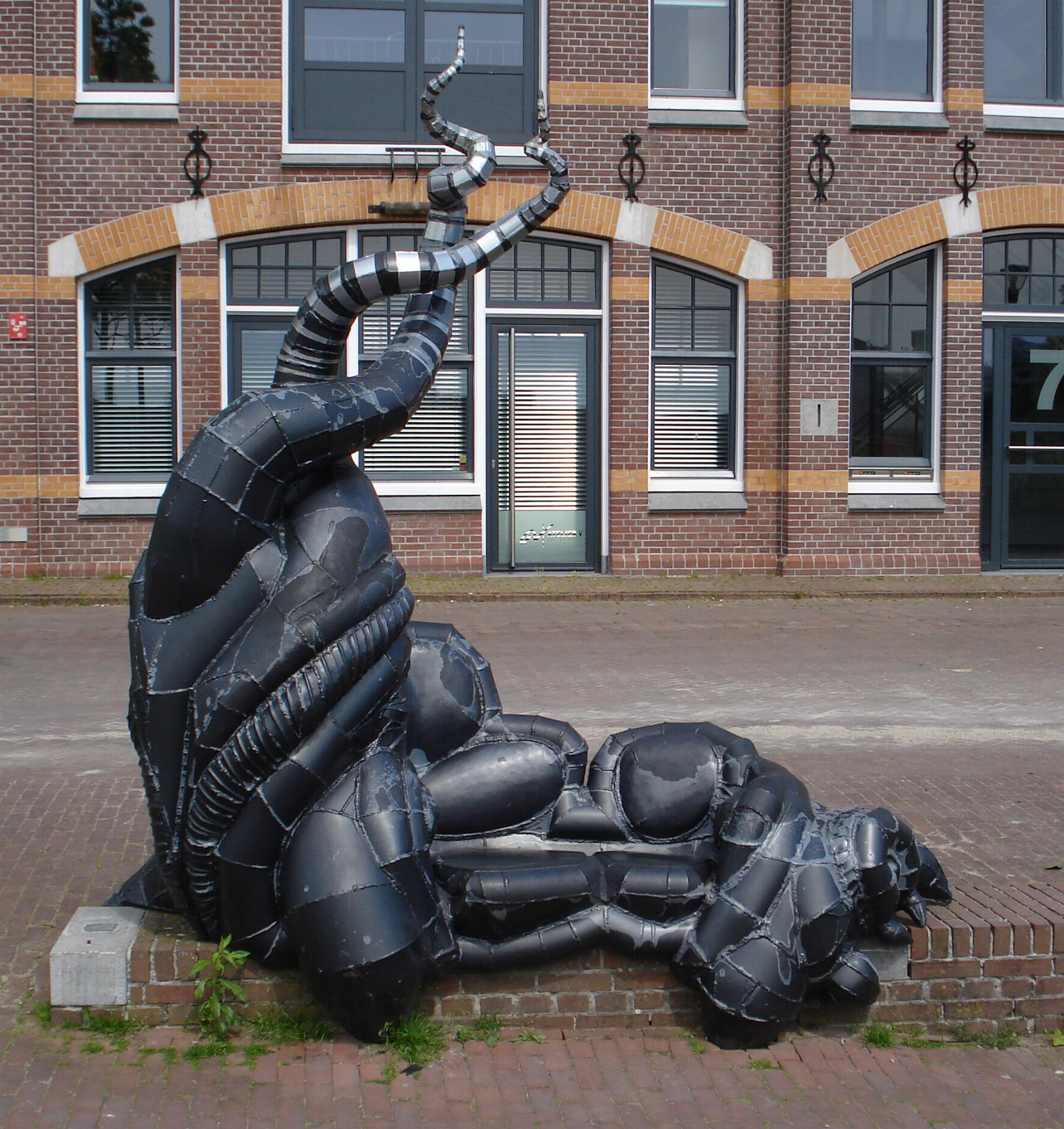 Amersfoort, Grote Koppel. Kunstwerk "Verpopping" (2007) van Thijs Trompert. Amersfoort/The Netherlands.